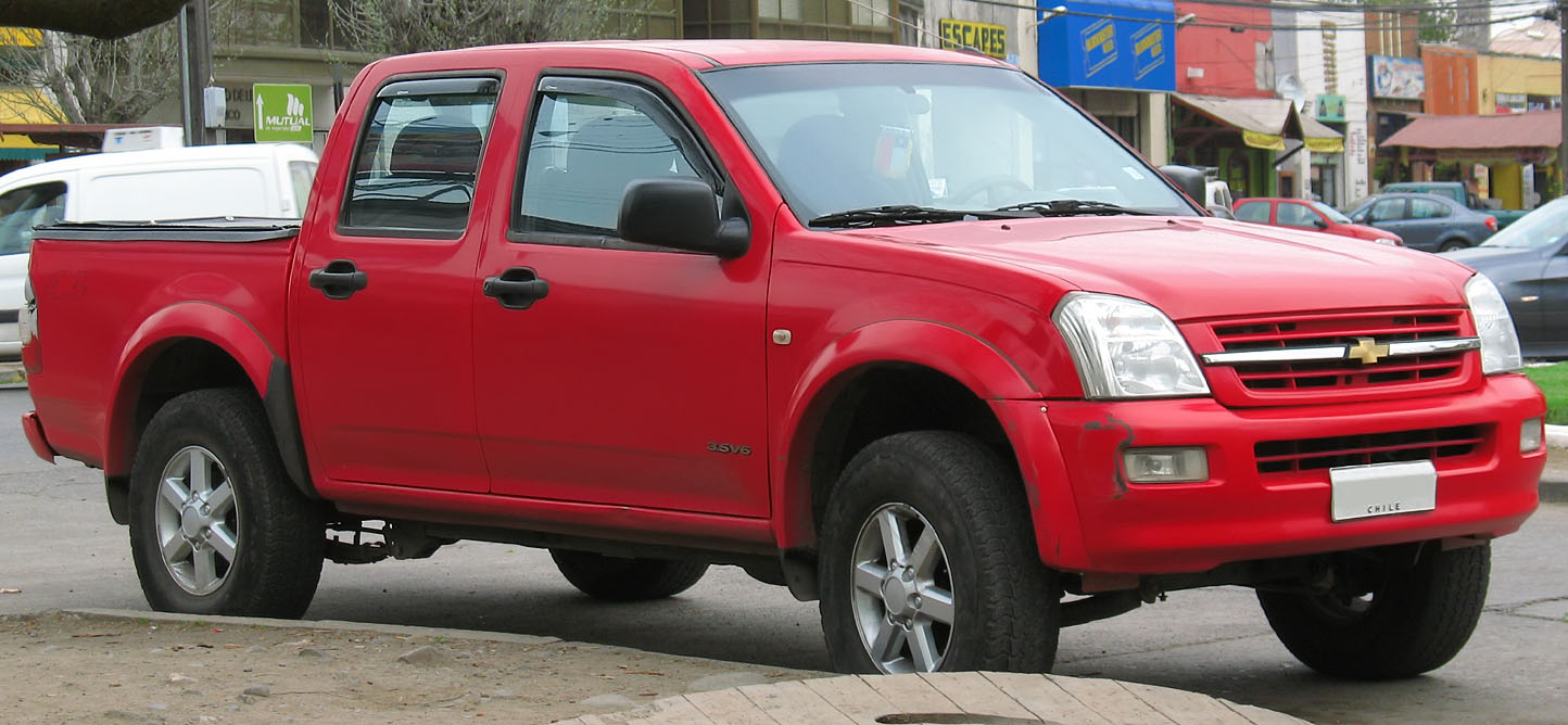 2008 Chevrolet D-Max